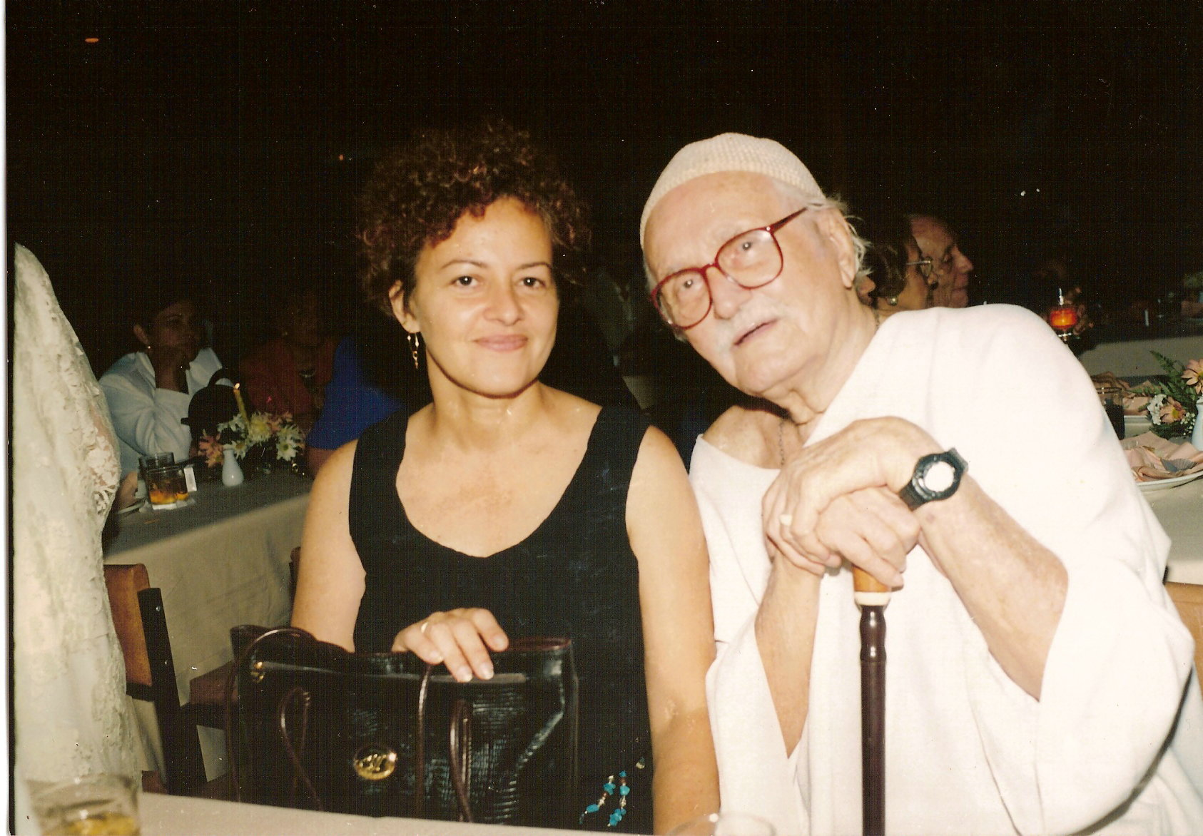 Jocelyn em traje de gala, acompanhado de Leila, nas Bodas de Ouro de Edyr e Celeste Proença.